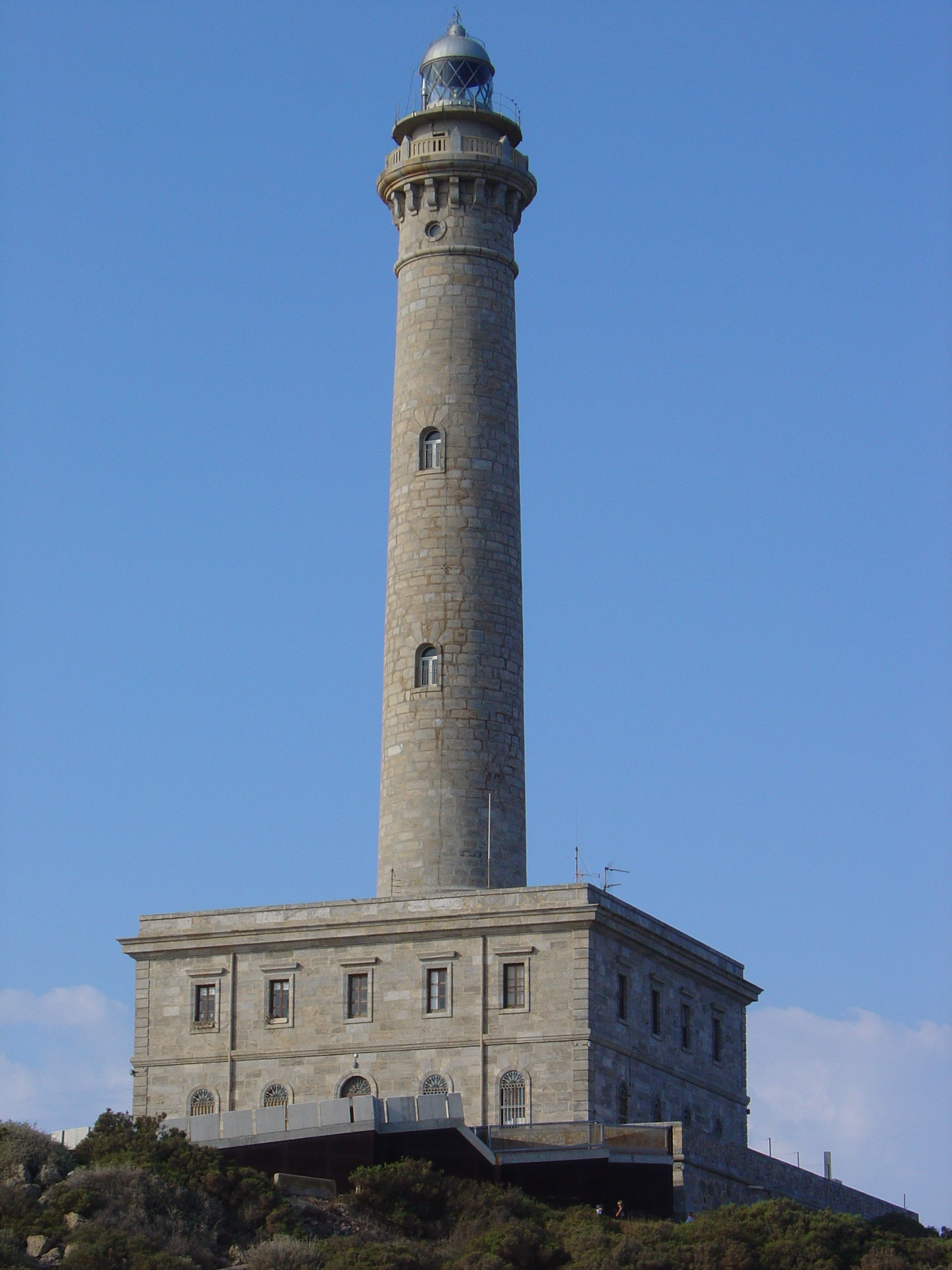 Faro de Cabo de Palos, Murcia, Spain